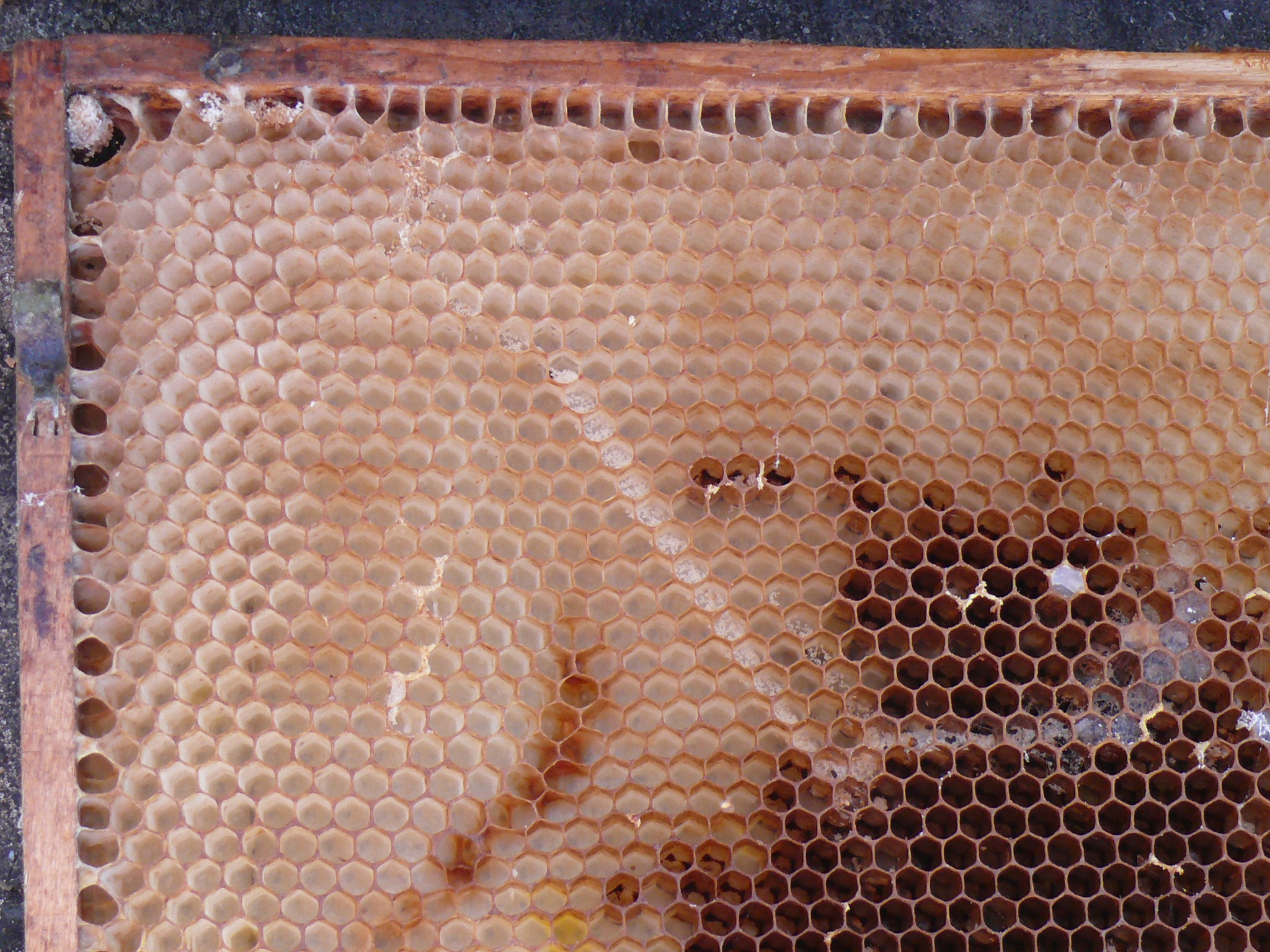 Fraßgang einer einzelnen Wachsmottenlarve. Nach Beendigung des Wachstums verlässt die Made die Bienenwabe und verpuppt sich. In diesem Fall gleich links oben am Holzrähmchen.